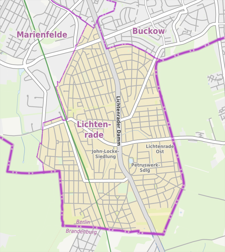 Übersichtskarte der Straßen und Ortslagen in Berlin-Lichtenrade